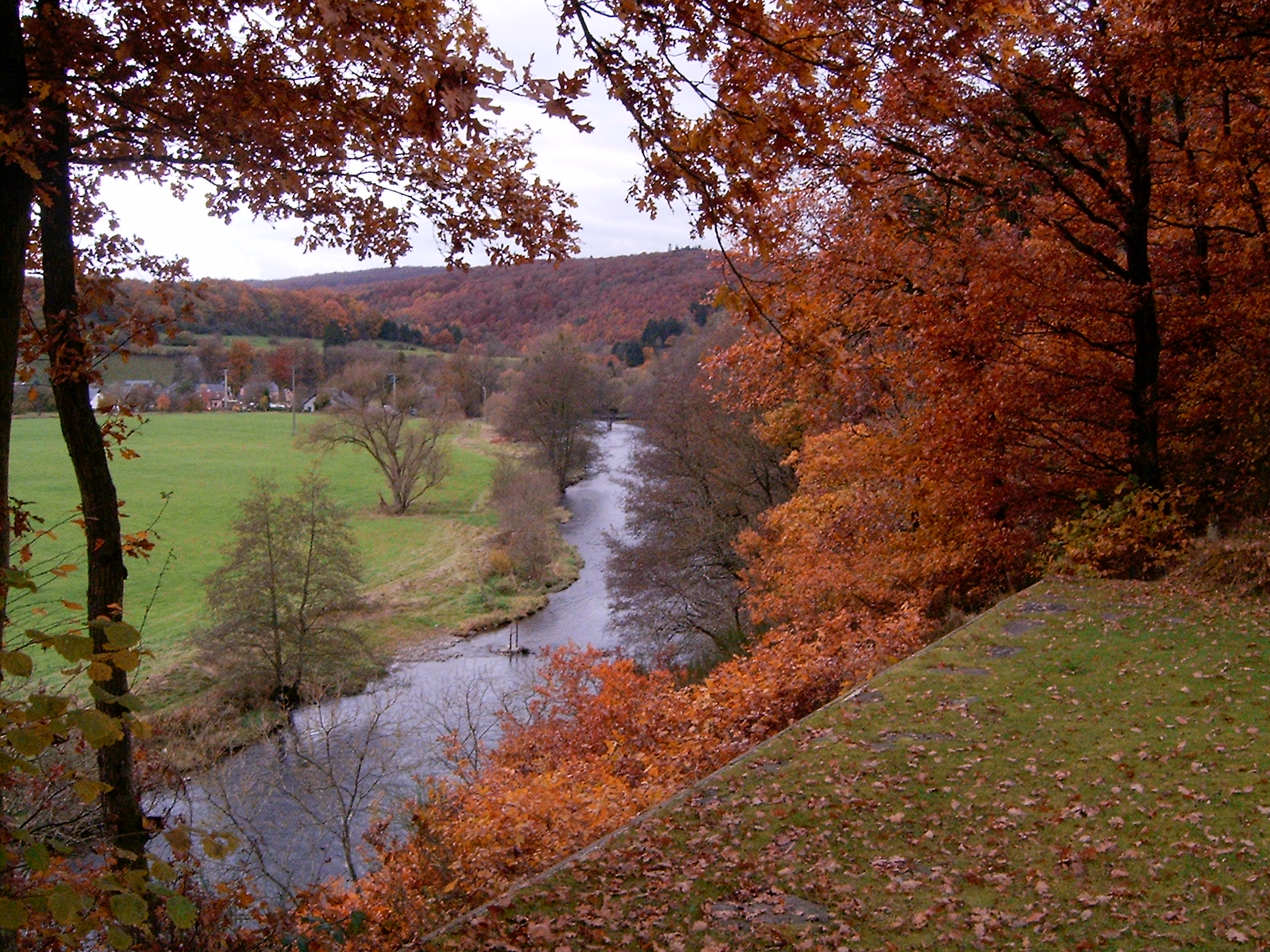 Ourthe in Belgie